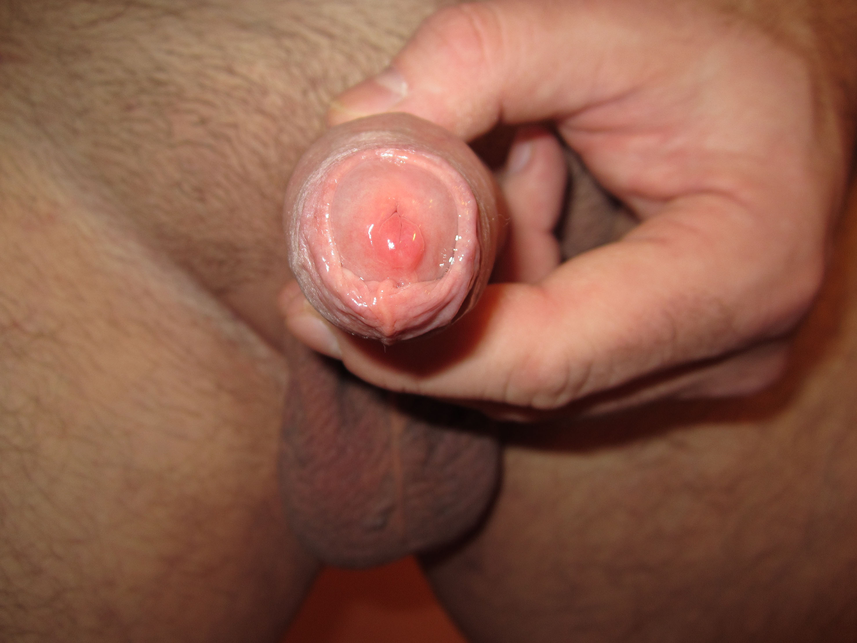 kožica moškega spolnega organa in predsemenska tekočina.